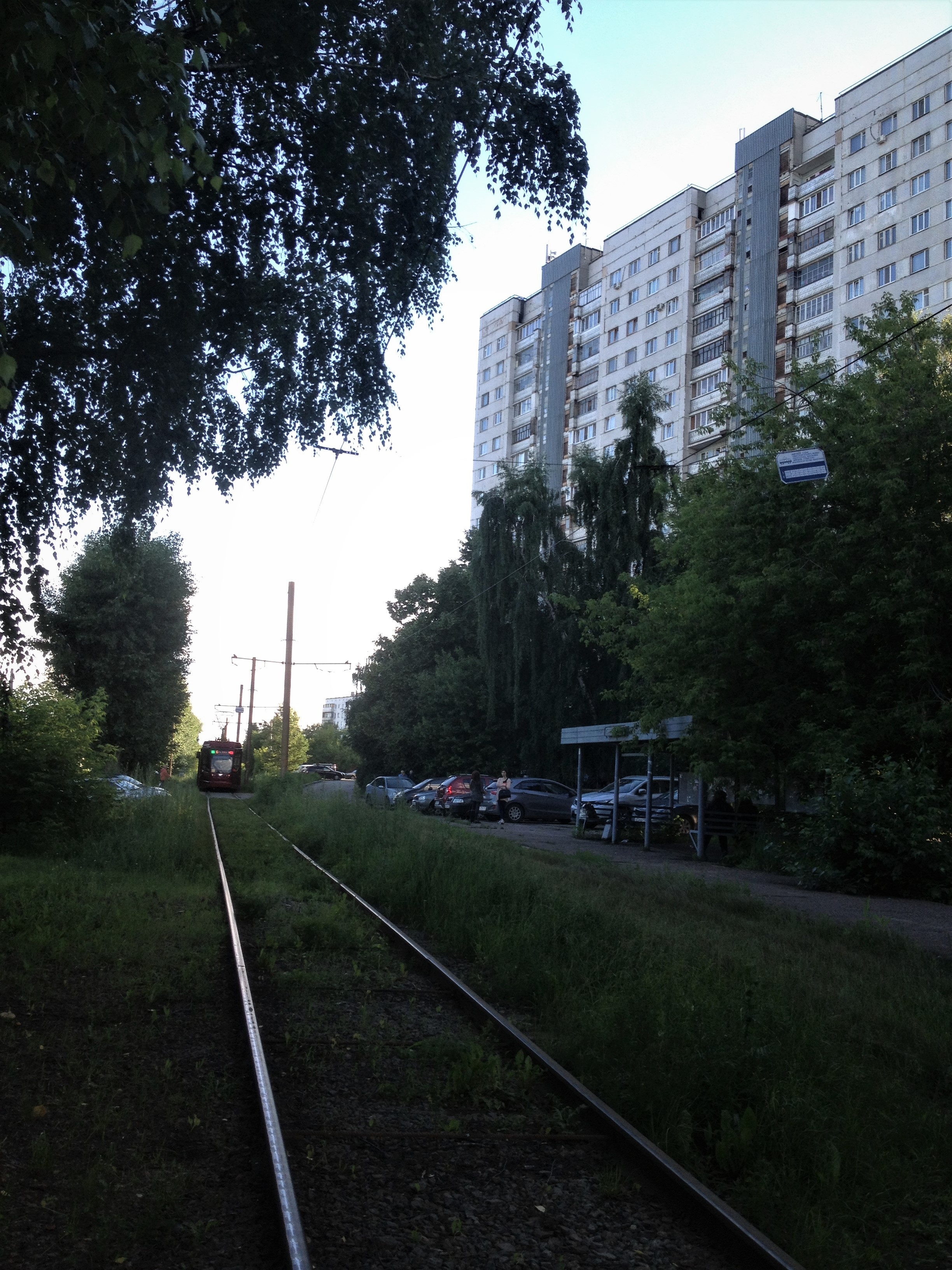 остановка трамвая «Мировые судьи Авиастроительного района» на ул. Трамвайная (г. Казань).